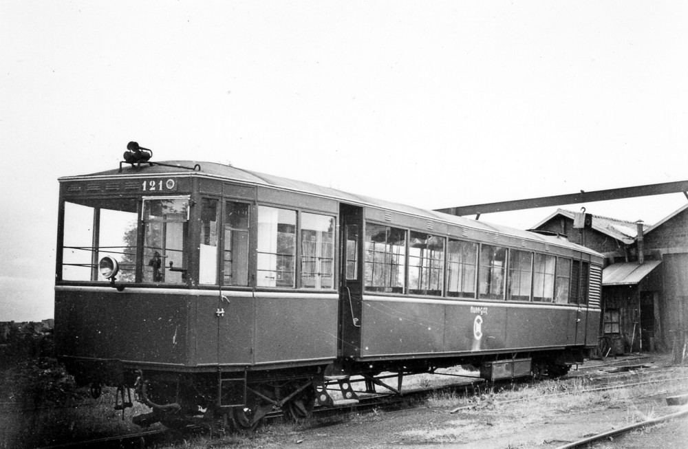 Autorail Renault-Scemia NK (1924) n° 121 du Chemins de fer des Côtes-du-Nord à Saint-Brieuc